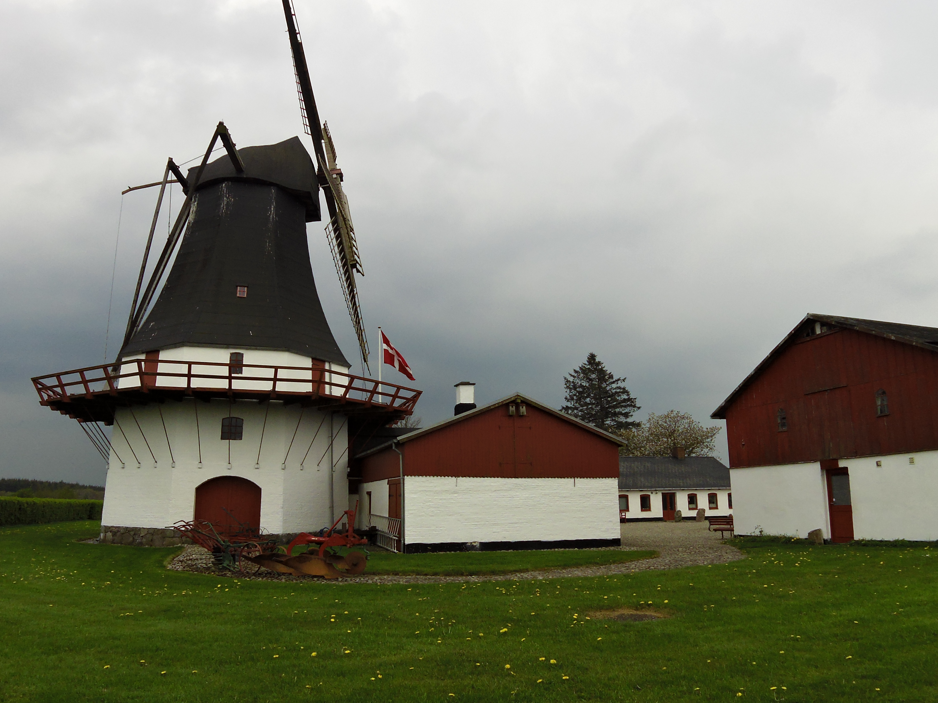 Damgård Mølle